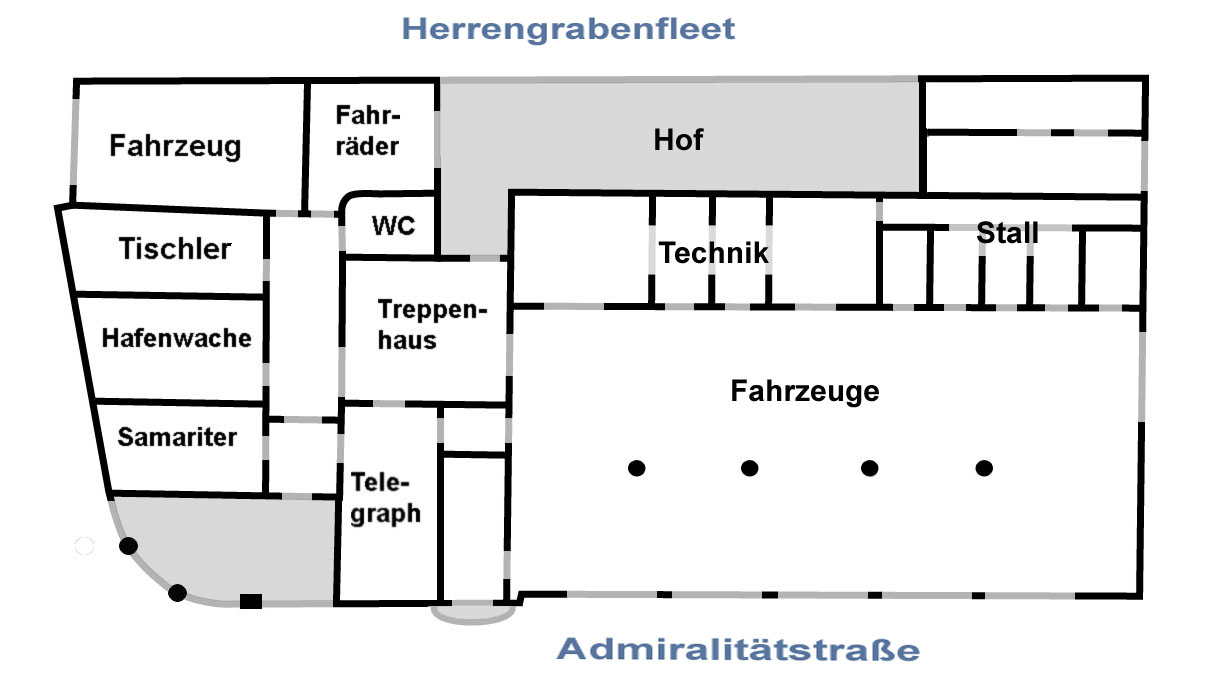 Hamburg, Feuerwache Innenstadt, Ursprünglicher Grundriss, Foto: 2015